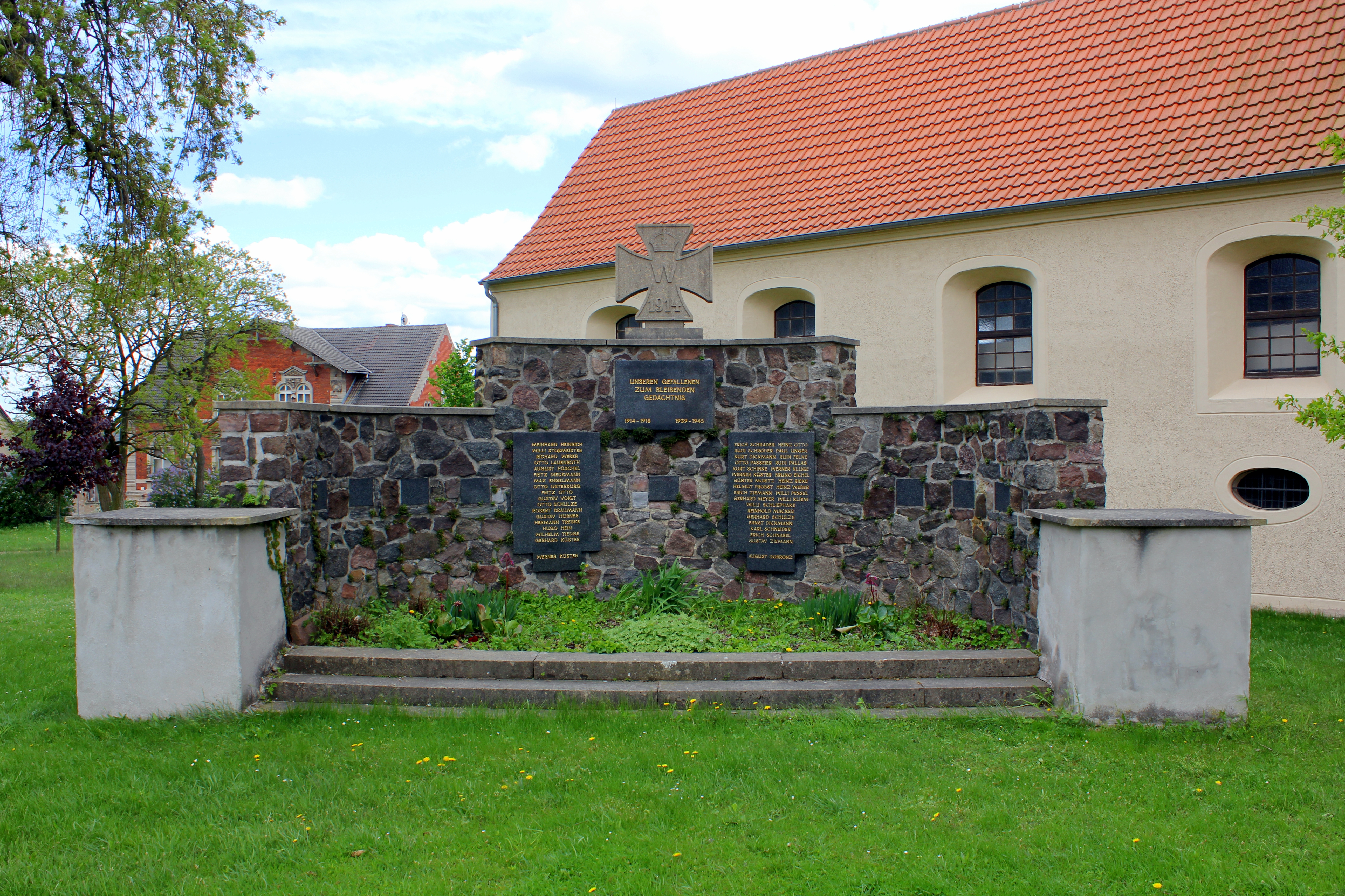 Kriegerdenkmal, Magdeburger Straße, Zielitz